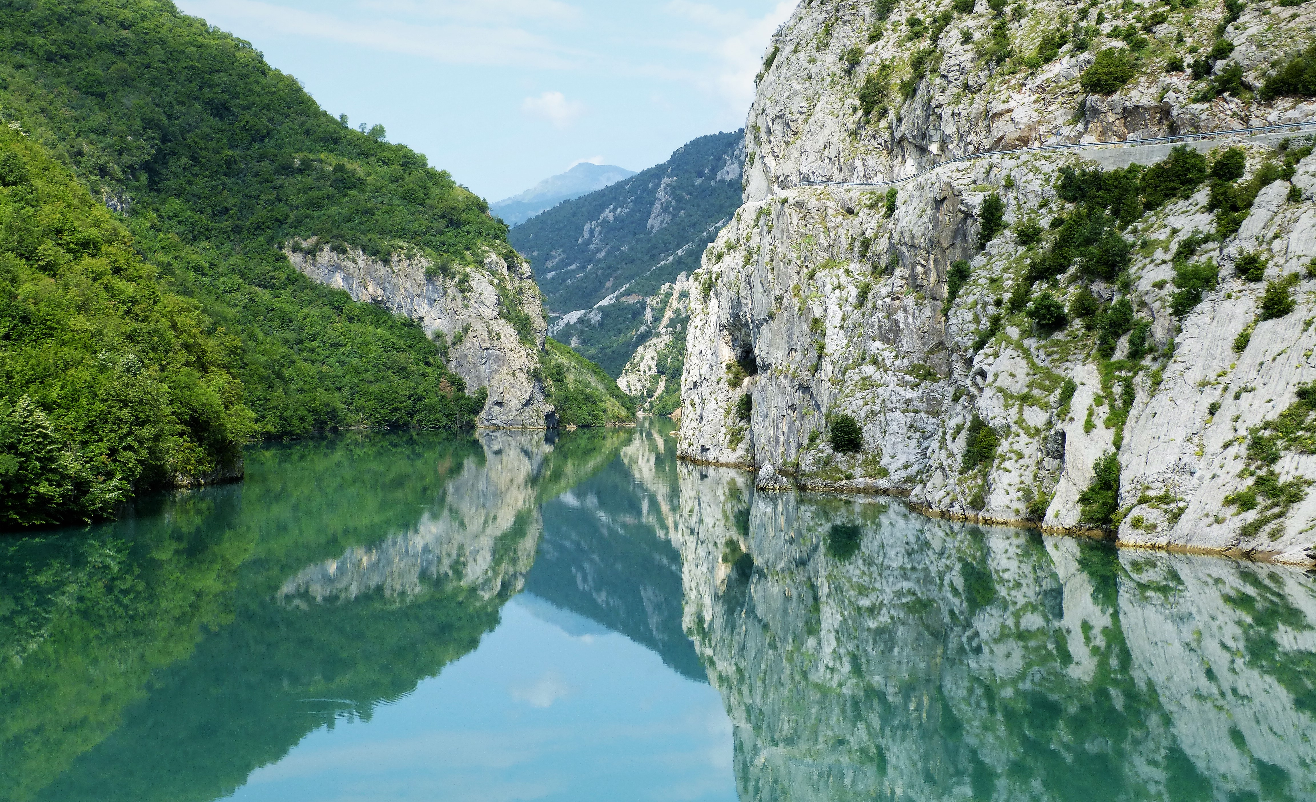 Koman Ferry, Albania